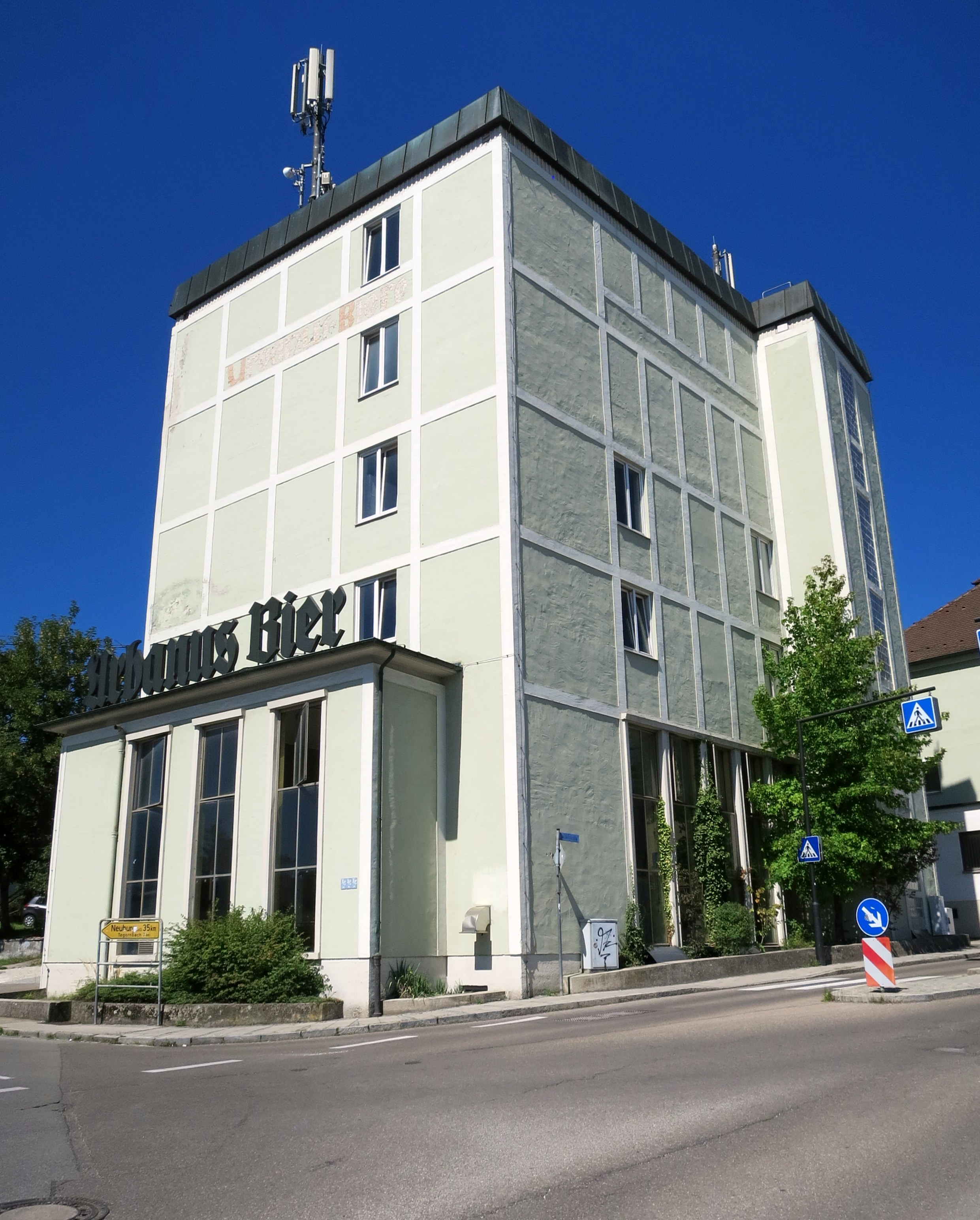 Eine der zwei verbliebenen Brauereien in Pfaffenhofen an der Ilm